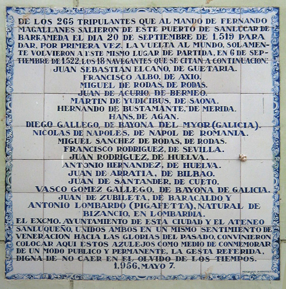 Placa de conmemorativa de la 1ª Circunnavegación de la Tierra, Sanlucar de Barrameda (Cádiz-Andaslucía-España-UE)